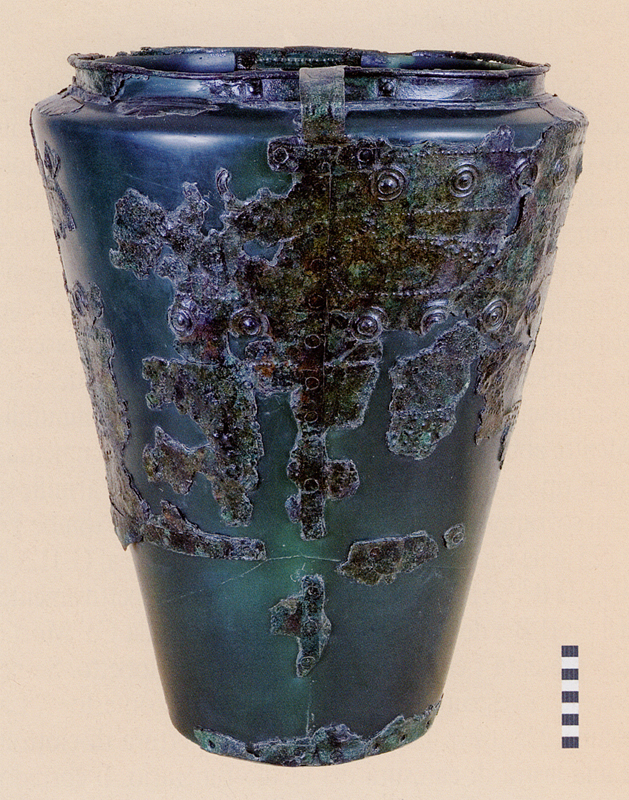 Situla in lamina bronzea, tipo Kurd con decorazione figurata a punti, borchiette a sbalzo, biansata; 4 fasce decorate orizzontali nella parte superiore: successione di borchie e cordonature circolari; sequenza di uccelli con becco adunco e tre zampe; seconda successione di borchie e cordonature circolari; fregio figurato. Lo spessore sottile delle lamine indica un uso cerimoniale.